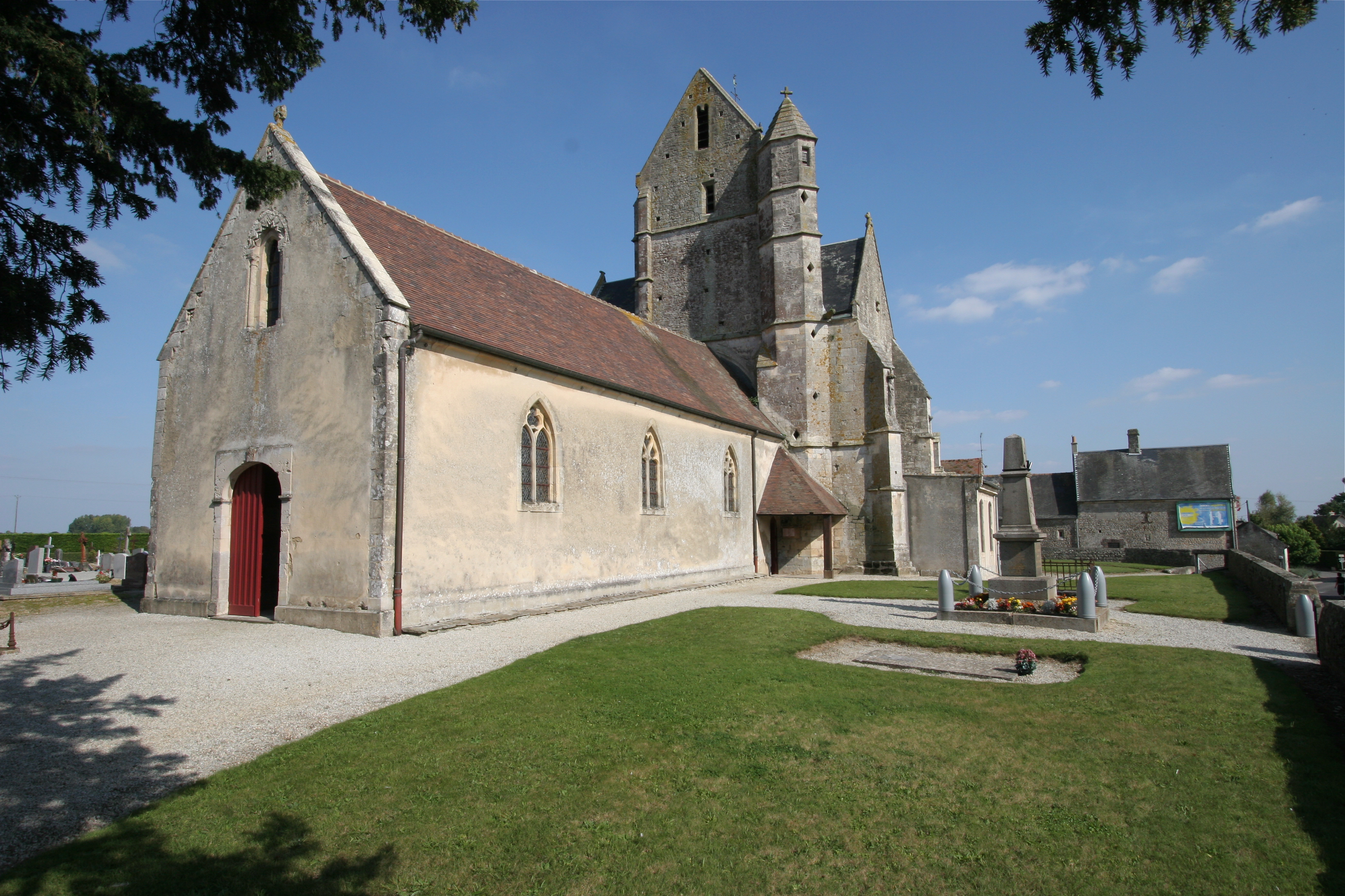 Église de Villers-Canivet (Calvados, France)